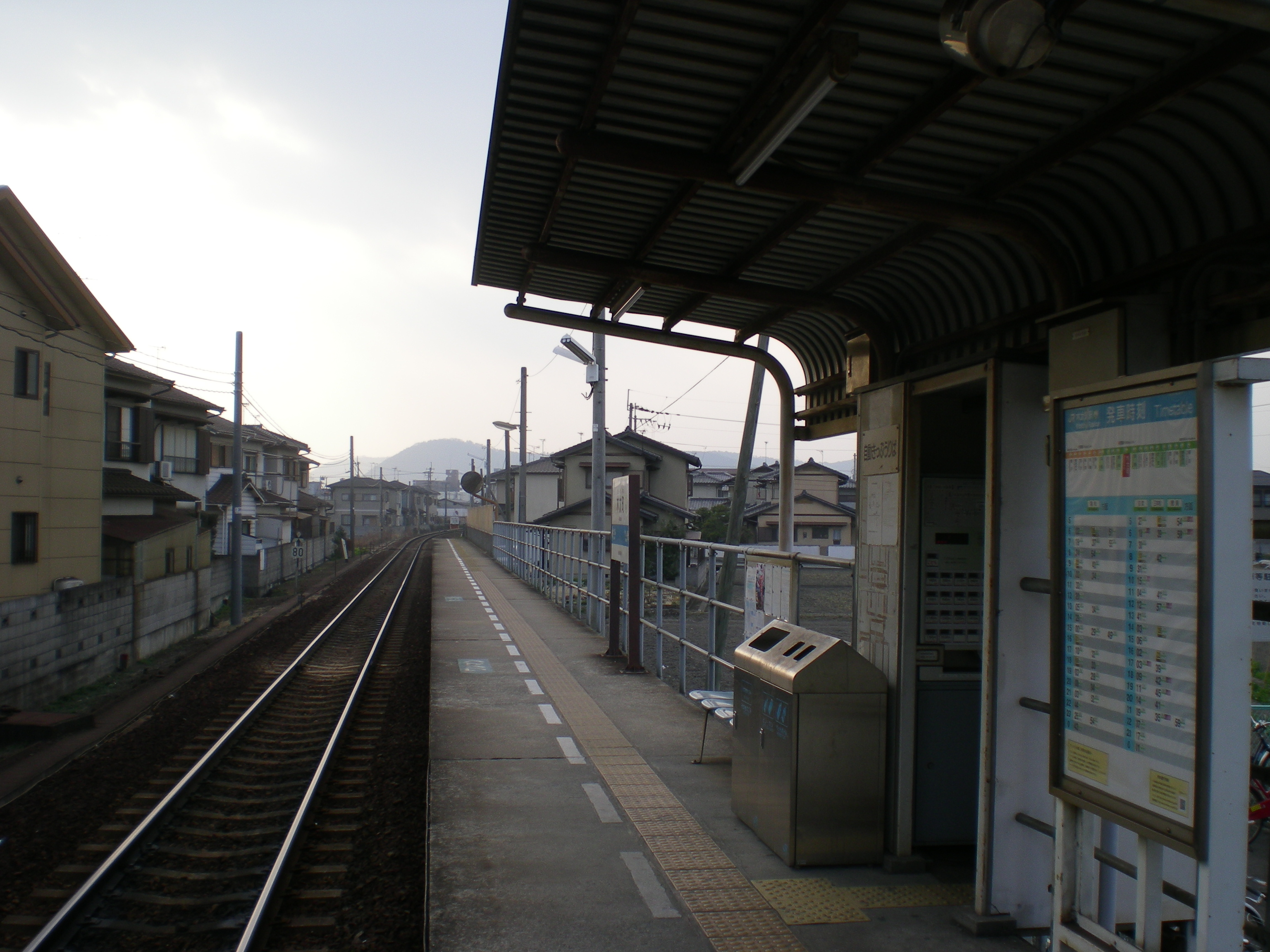 JR Shikoku Kitacho Station